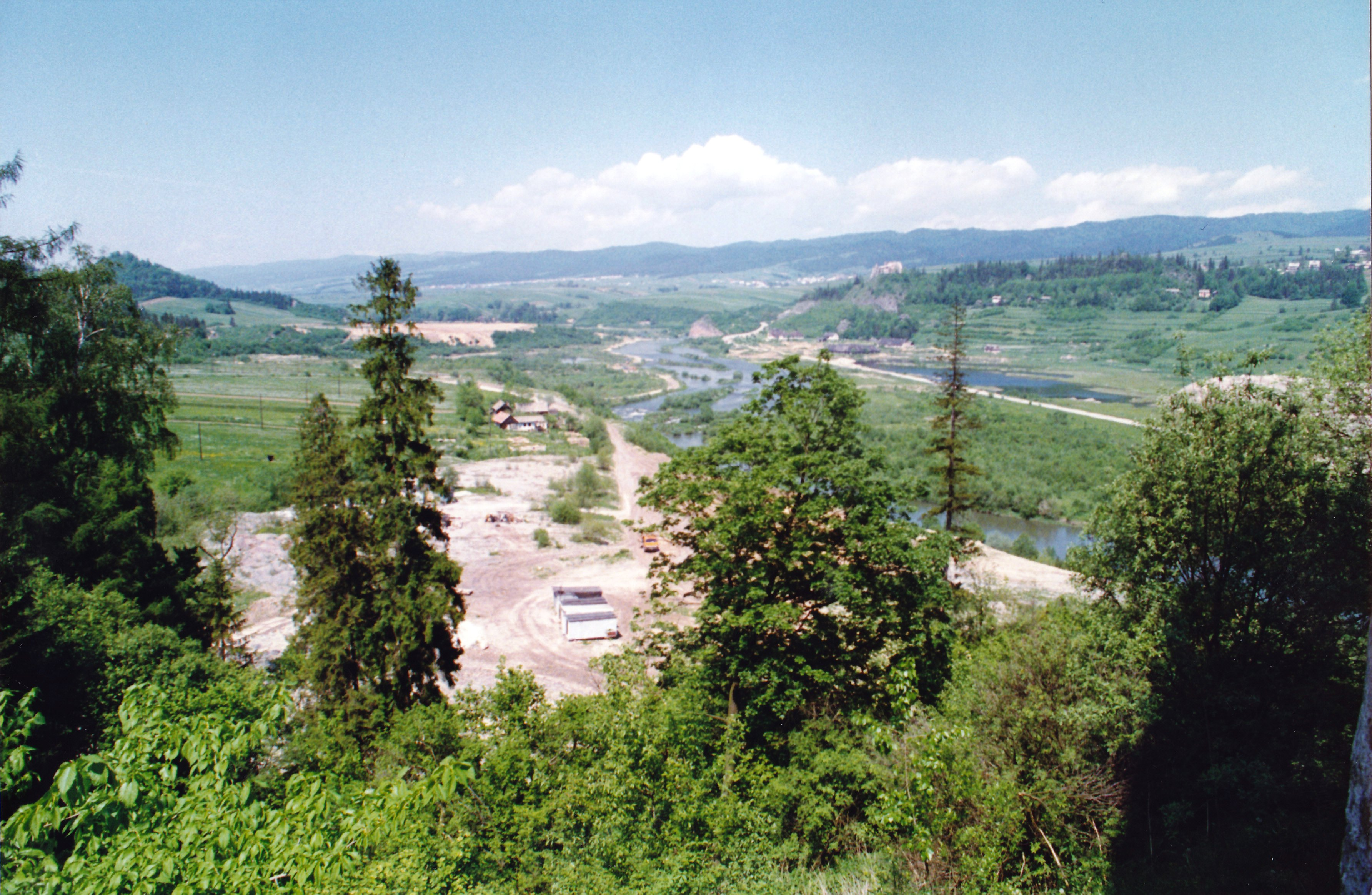 Dolina Dunajca między zamkami w Niedzicy (skąd zrobiono zdjęcie) i w czorsztynie (widocznym na prawo od centrum zdjęcia) w 1994 roku